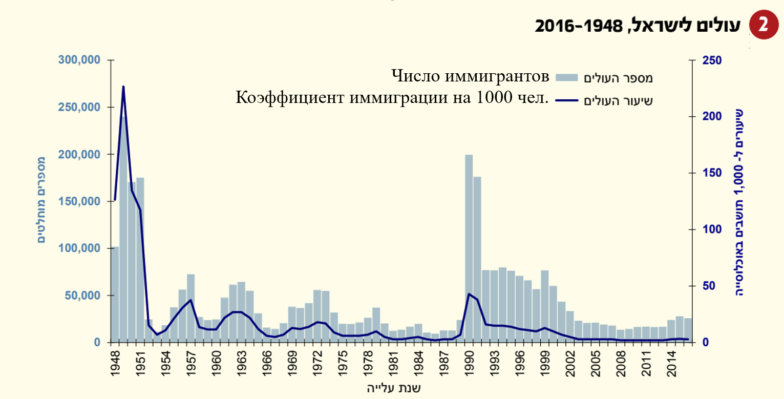 Число иммигрантов в Израиль 1948-2016